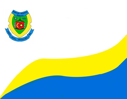 Bendera SMK Desa Petaling